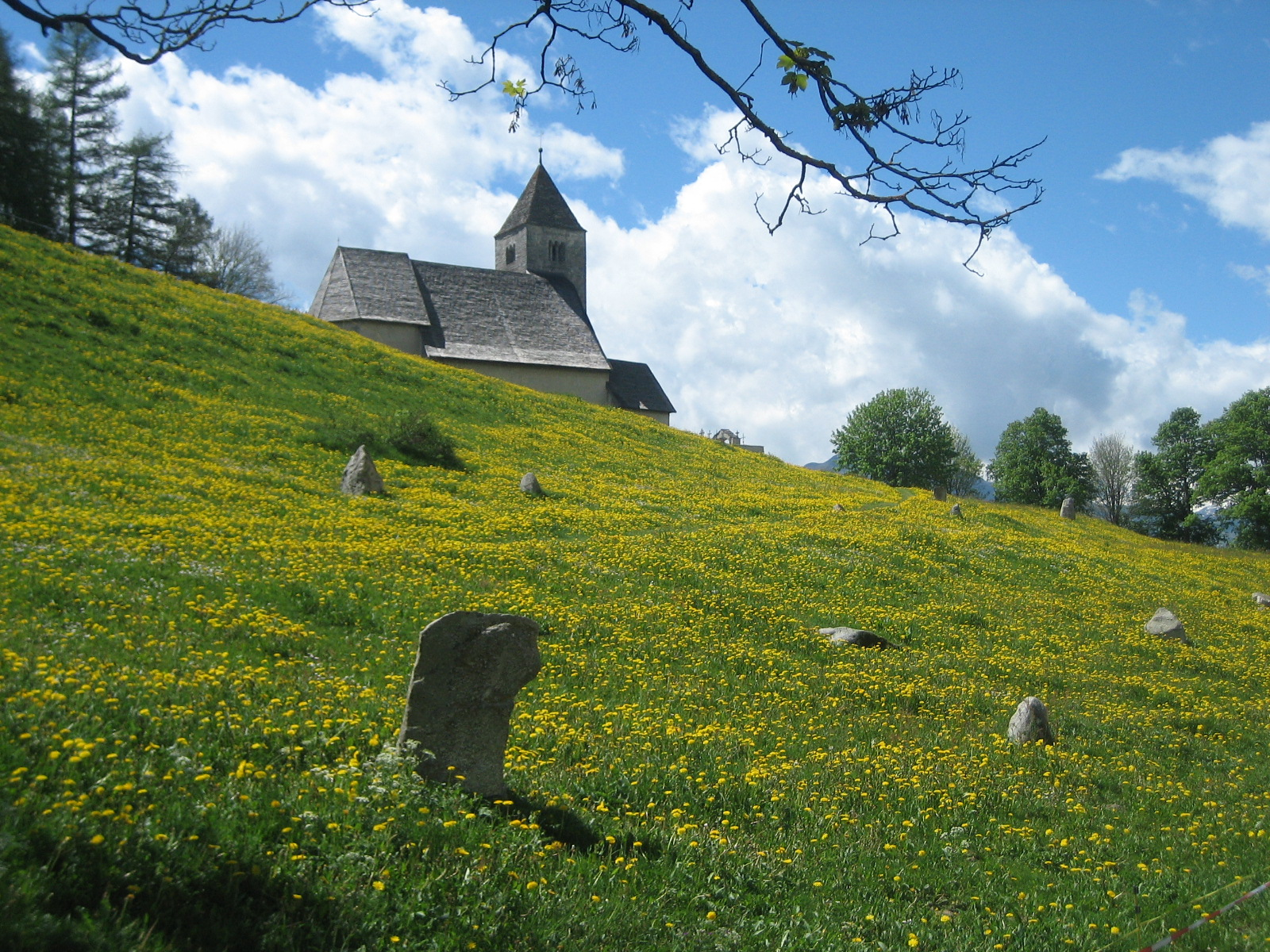 Kirche San Remigius mit Menhiren